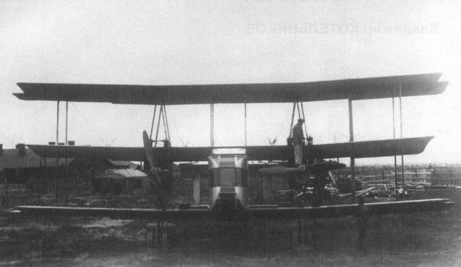 КОМТА на территории Ходынского аэродрома перед опробованием двигателей. Летный сезон 1922г